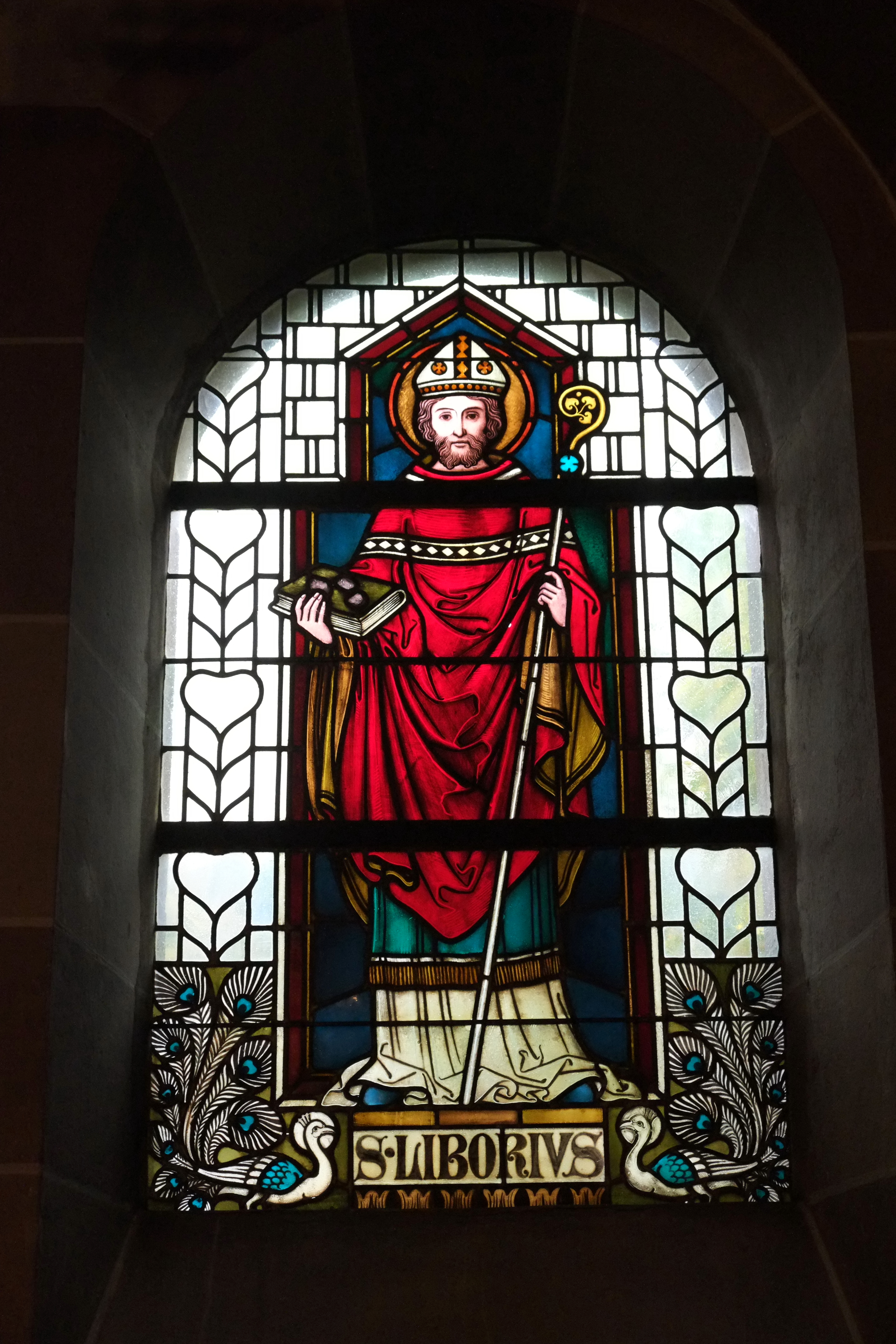 Bleiglasfenster in der Kirche St. Jodokus in Saalhausen, einem Ortsteil von Lennestadt in Nordrhein-Westfalen, Darstellung: hl. Liborius